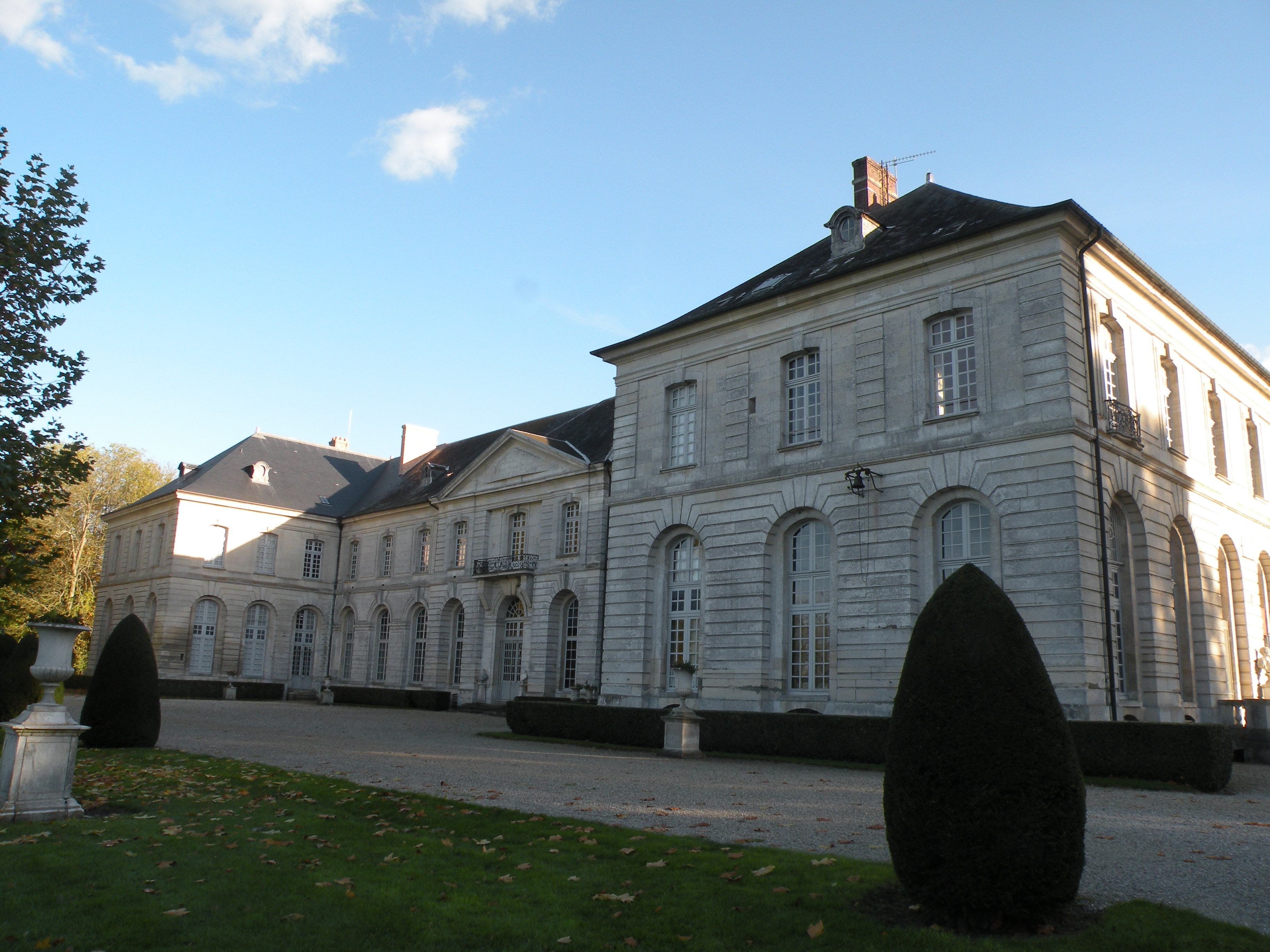 Abbaye de Chaalis - Palais abbatial